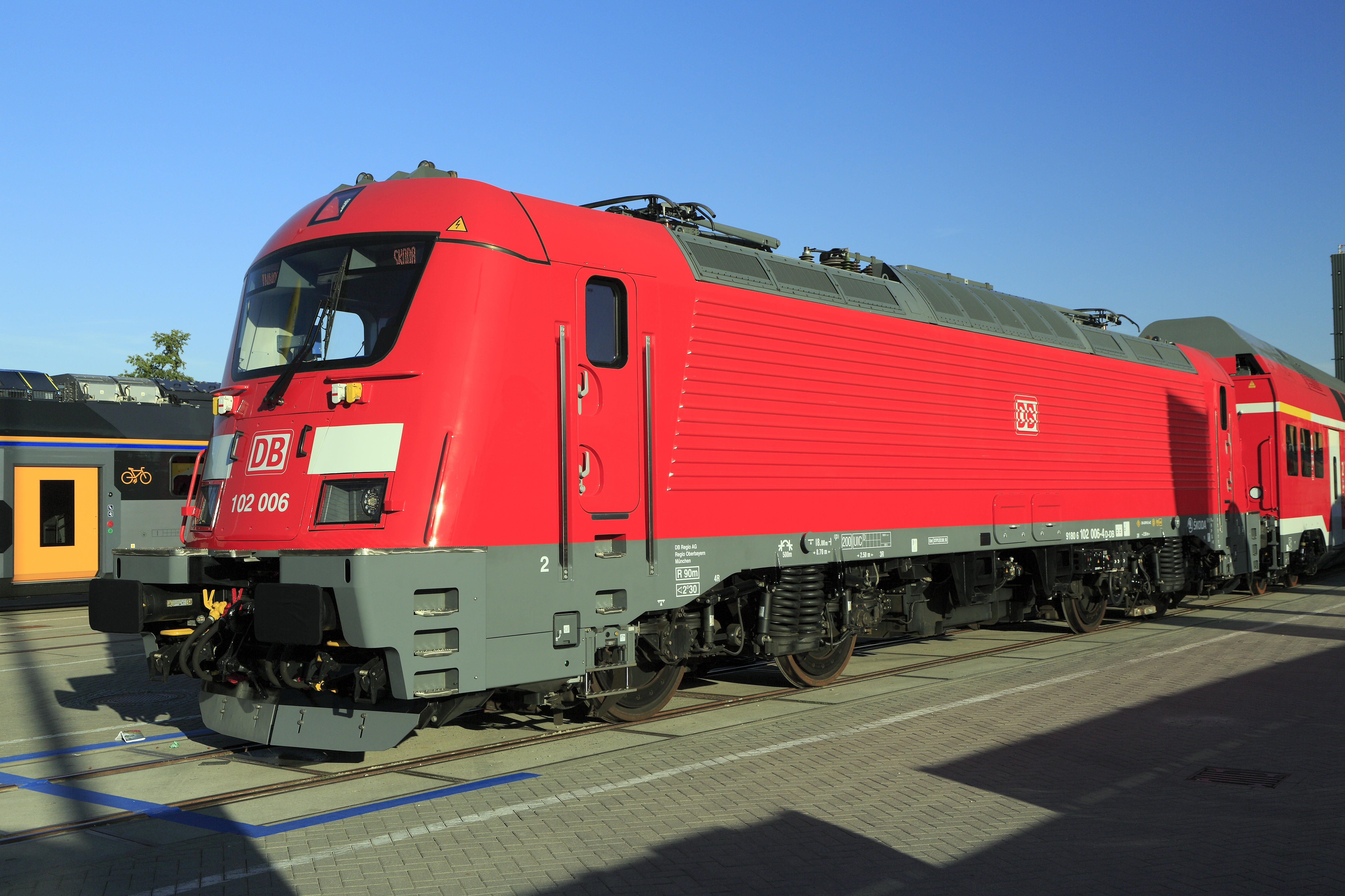 Lokomotive des Škoda-Typs 109E. Die DB Regio Oberbayern hat acht Maschinen mit Doppelstockwagenzügen für den Regionalverkehr auf der Schnellfahrstrecke München–Nürnberg über Ingolstadt bestellt, im Gegensatz zu den an die ČD gelieferten Dreisystemlokomotiven jedoch nur für 15 kV bei 16,7 Hz. Ein sichtbarer Unterschied zu den Maschinen der ČD und ZSSK sind die zusätzlichen gelben UIC-Kuppeldosen. Inzwischen ist die Maschine schon eine Weile gelaufen, an den Drehgestellen ist es auf den zweiten Blick sichtbar.